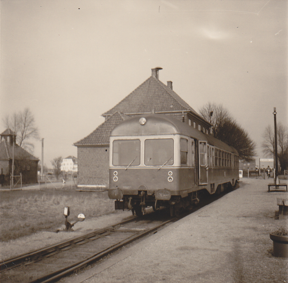 MaK GDT der Kiel-Schönberger Eisenbahn in Schönberger Strand